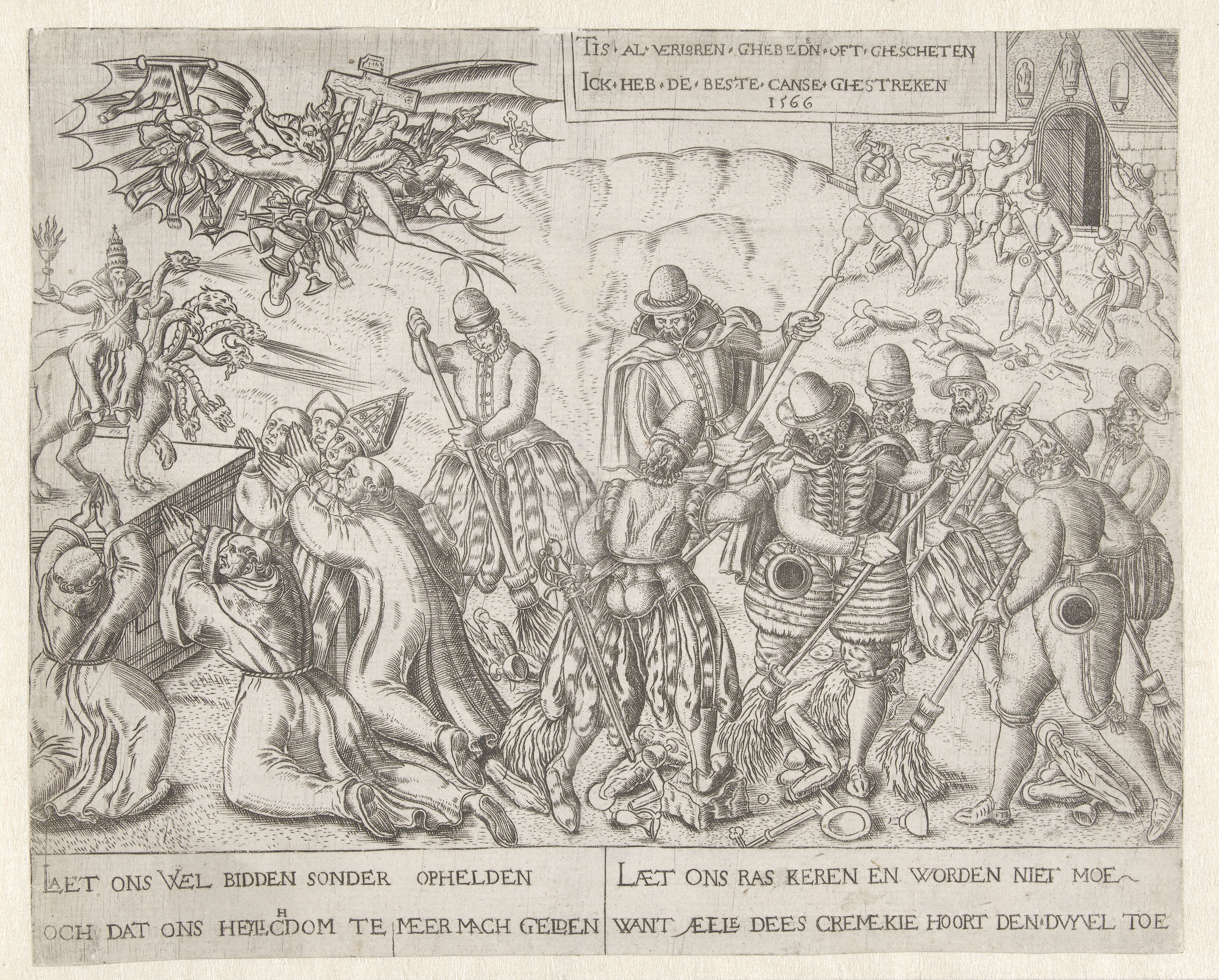 IdentificatieTitel(s): Protestanten maken schoon schip in een katholieke kerkDe beeldenstorm door de geuzen, 1566Objecttype: prent propagandaprent Objectnummer: RP-P-OB-76.780Catalogusreferentie: FMH 479-AOpschriften / Merken: opschrift, linksonder: ‘LAET ONS WEL......TE MEER MACH GELDEN’opschrift, rechtsonder: ‘LAET ONS RAS.....HOORT DEN DVYVEL TOE’opschrift, rechtsboven: ‘TIS AL ..... CANSE GHESTREKEN’datum, rechtsboven (onder opschrift): ‘1566’Omschrijving: De beeldenstorm door de geuzen, 1566. Links katholieken die het zevenkoppige Beest en de paus als de Babylonische hoer aanbidden, Waar: boven de duivel die met crucifix en miskelken wegvliegt. Rechts bovenaan is de beeldenstorm aan de gang: het afrukken en verbrijzelen der beelden. Vooraan geuzen die al de gebroken beelden en andere roomse voorwerpen wegvegen. Met opschrift van 2 regels en onderschrift van 4 regels in het Nederlands.VervaardigingVervaardiger: prentmaker: anoniemPlaats vervaardiging: NederlandenDatering: 1566Fysieke kenmerken: gravureMateriaal: papier Techniek: graveren (drukprocedé)Afmetingen: blad: h 177 mm × b 220 mmOnderwerpWat: iconoclasm(aspects of) Christian Religion or the Church (as institution) ridiculed, criticized, or caricaturizedTachtigjarige OorlogBeeldenstorm (1566)Wanneer: 1566 - 1566Verwerving en rechtenVerwerving: aankoop 1881Copyright: Publiek domein